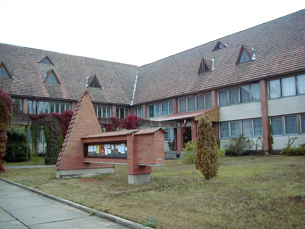 Mētrienas pagastnams 2002-09-21